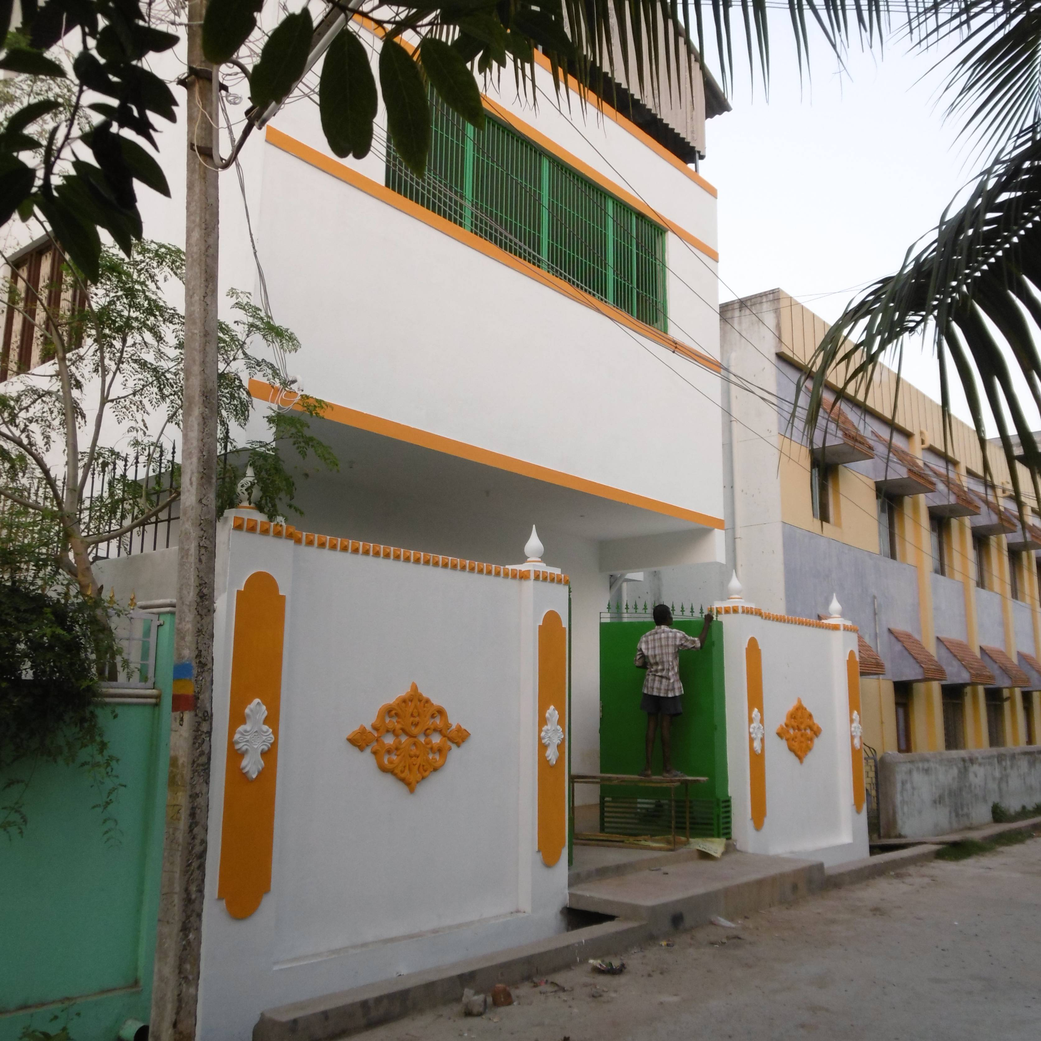 nouveau building